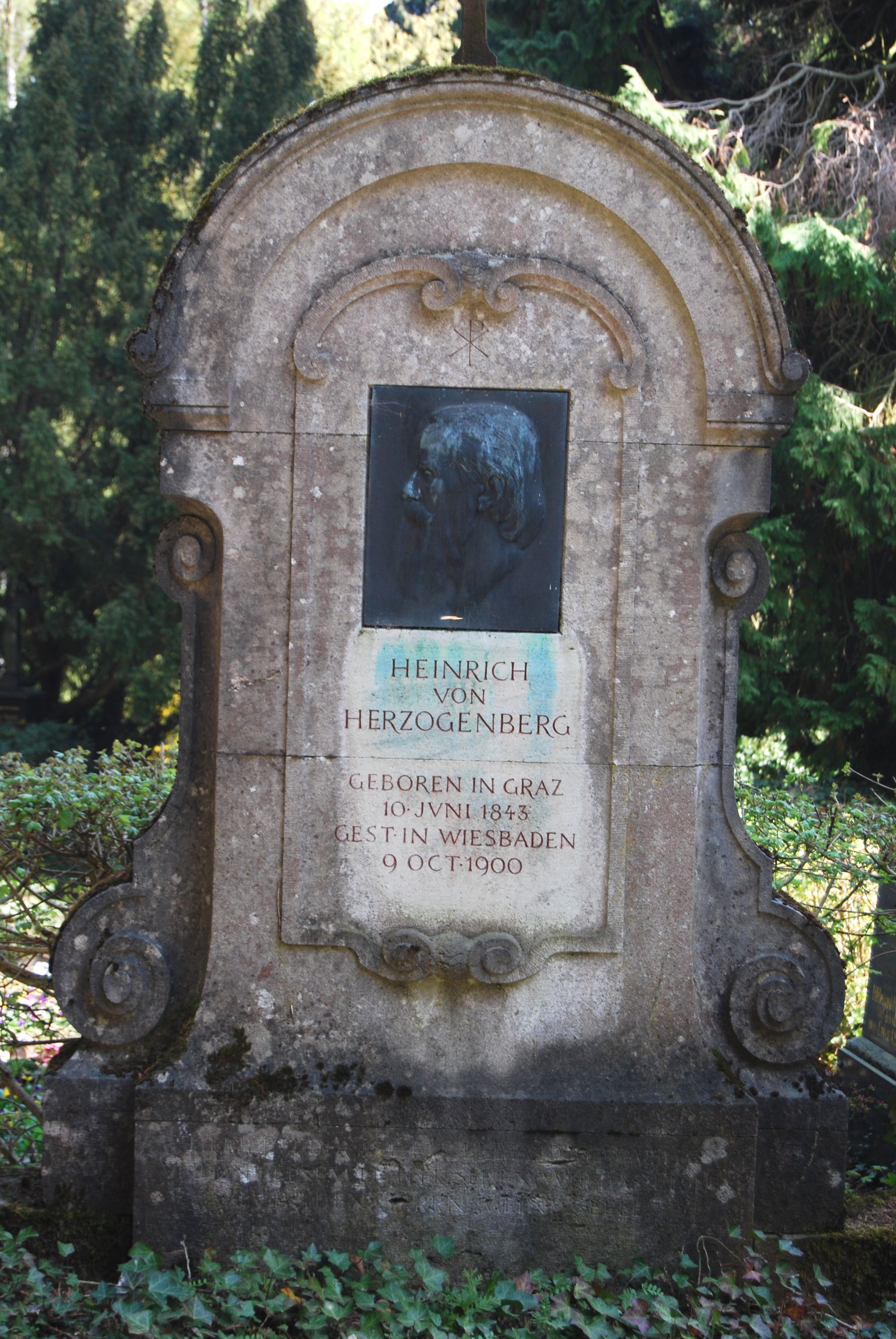 Grabmal Heinrich von Herzogenbergs